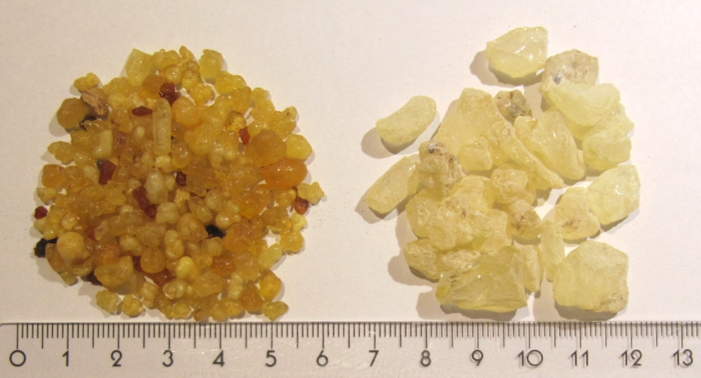 Weihrauch im Größenvergleich: Links minderwerte Qualität, rechts höchste Qualität